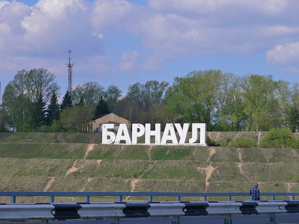 Barnaul letters